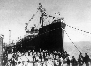 1952年10月17日，第一艘巨轮长春号停泊在重新开港的塘沽新港码头。